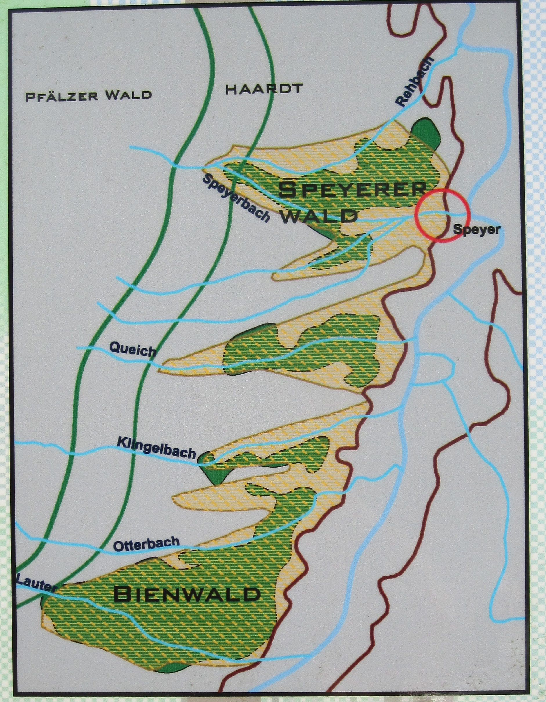 Carola Schnug-Bögerding, Doris Herrmann: Infotafel Speyerer Wald (Aufstellung an der Walderholung) im Auftrag der Stadtverwaltung Speyer, (fotographiert am 16. Mai 2012) nahe der Walderholung, 1. Richtweg, Speyer; Detail: Pfälzer Bäche mit ihren Schwemmkegeln und Wäldern.